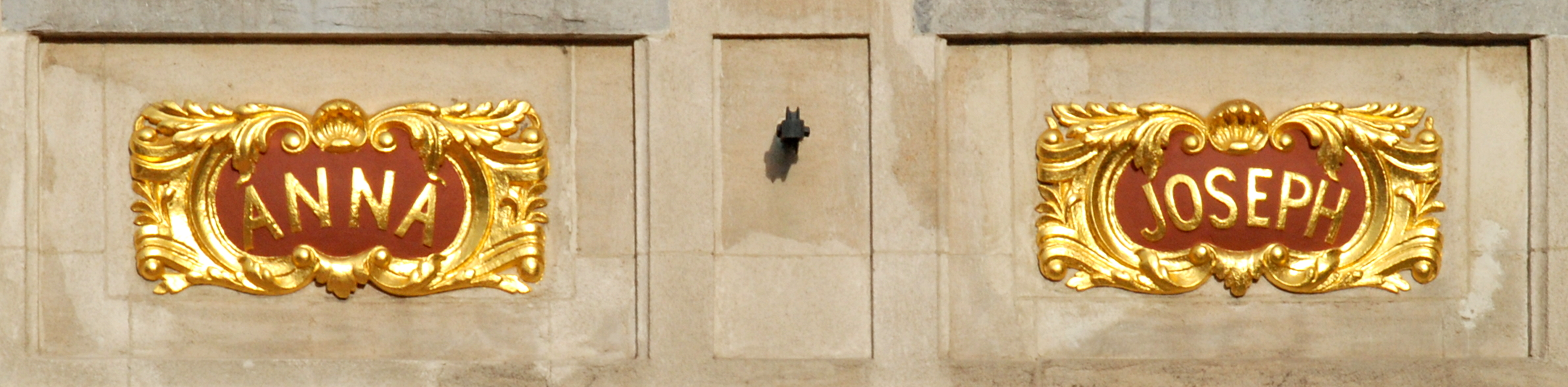 Belgique - Bruxelles - Grand-Place - Maison de Joseph et Anne